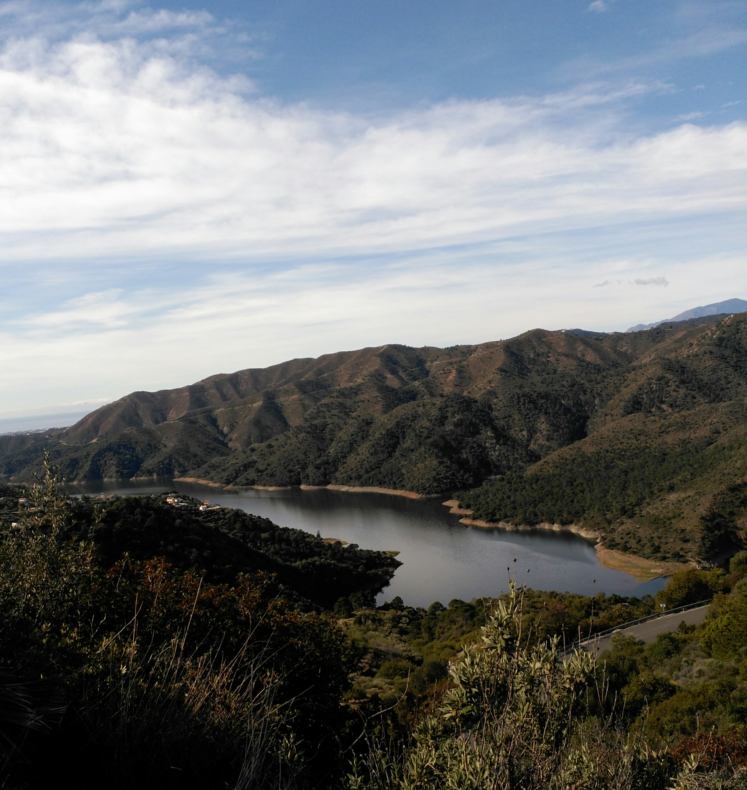 Río Verde This is a photography of a Site of Community Importance in Spain with the ID: ES6170019. Natura2000 entry, EEA entry